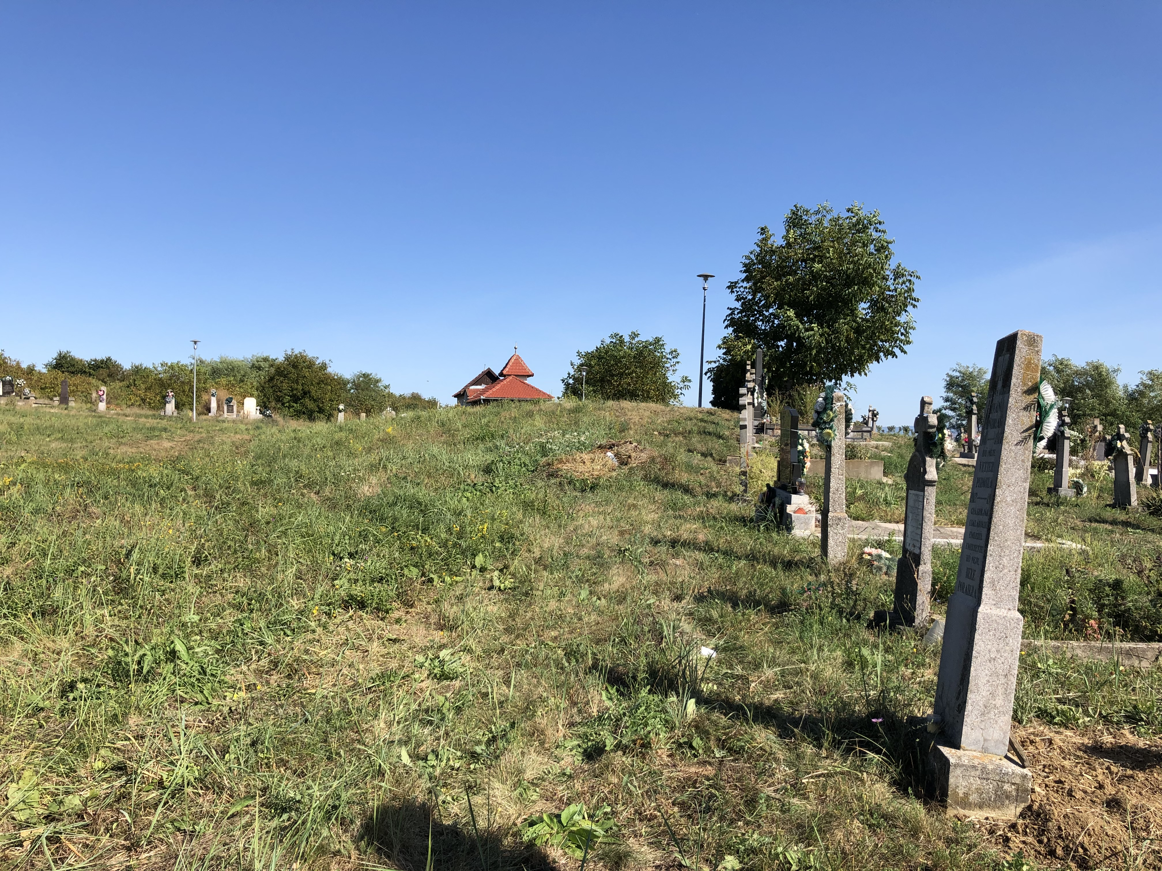 Ruine mănăstire